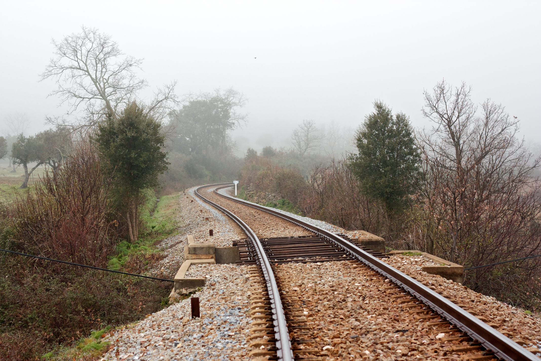 Via férrea: Ramal de Cáceres [PK 217] Local: Alagoa Data e hora: 29 de Janeiro de 2011 [10h03] Sentido: Torre das Vargens